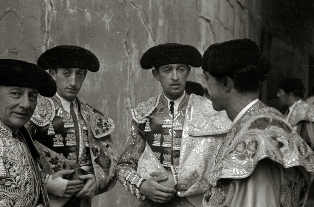 Título original: Corrida de toros en la plaza de 'El Txofre' (15/79) Localización: San Sebastián (Guipúzcoa)